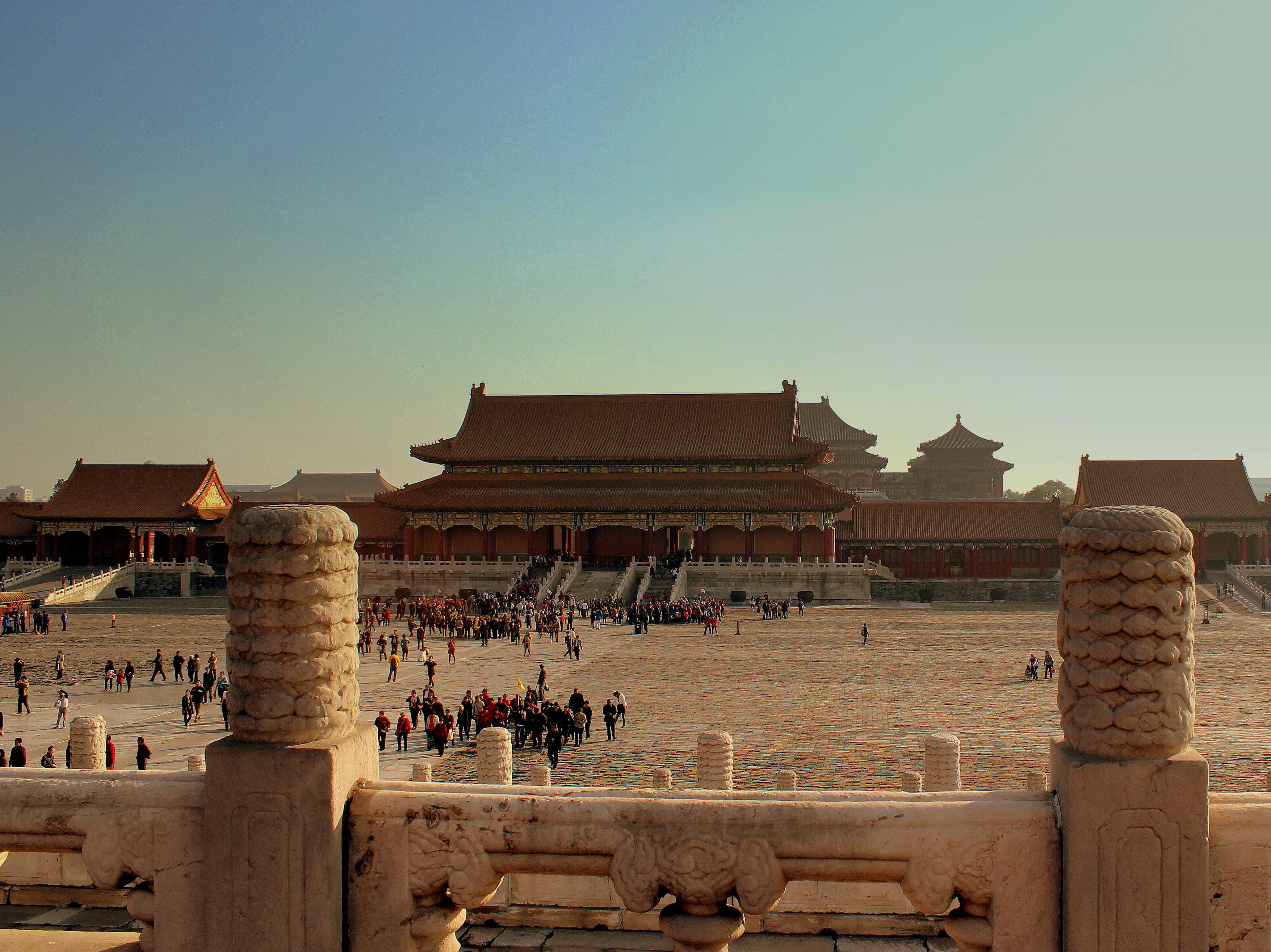 FORBIDDEN CITY BEIJING CHINA OCT 2012